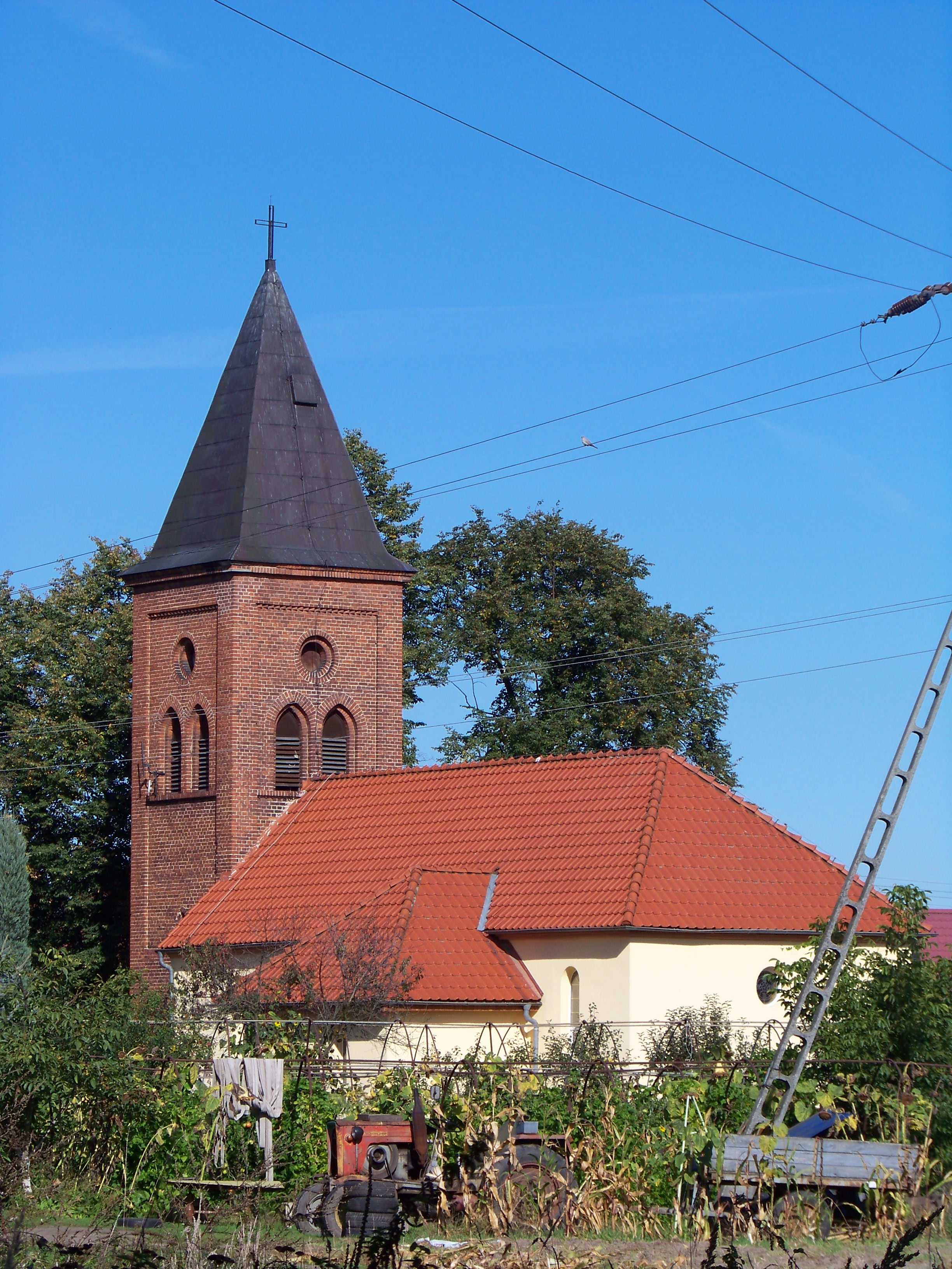 kaplica z wieżą Przecza, Lewin Brzeski 09.1966.